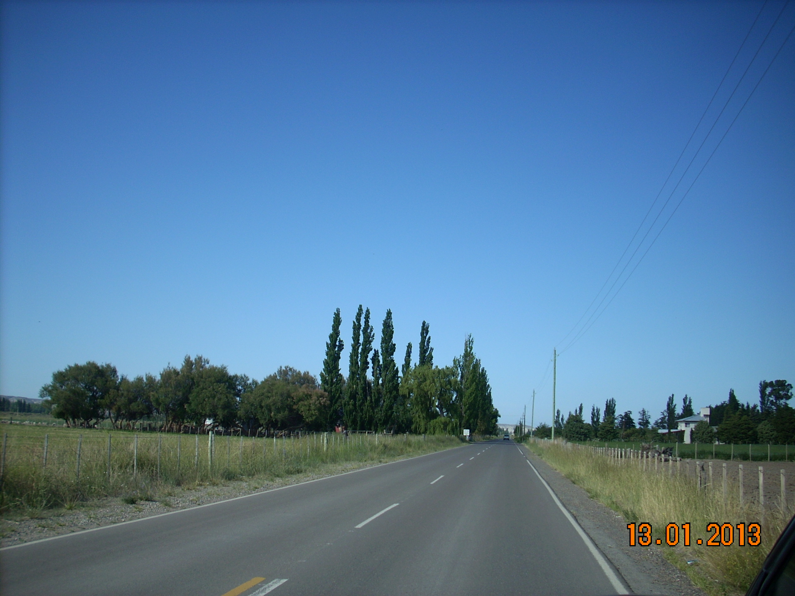 Vista de la Ruta Prov. 7 y el valle inferior del río Chubut entre Trelew y Gaiman